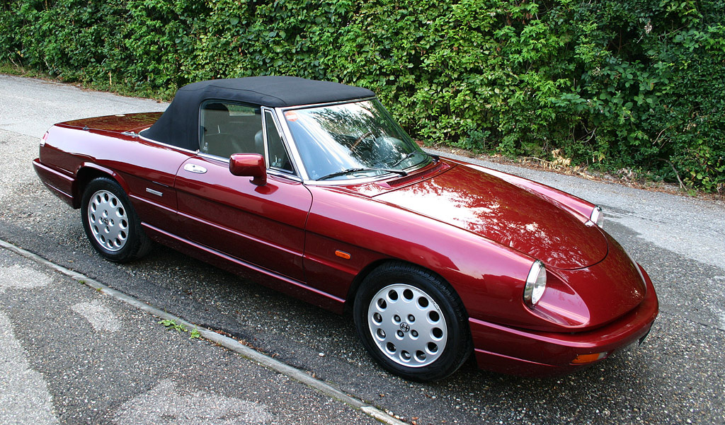 Alfa Romeo Spider 2.0, Serie 4 (1990-93), top up